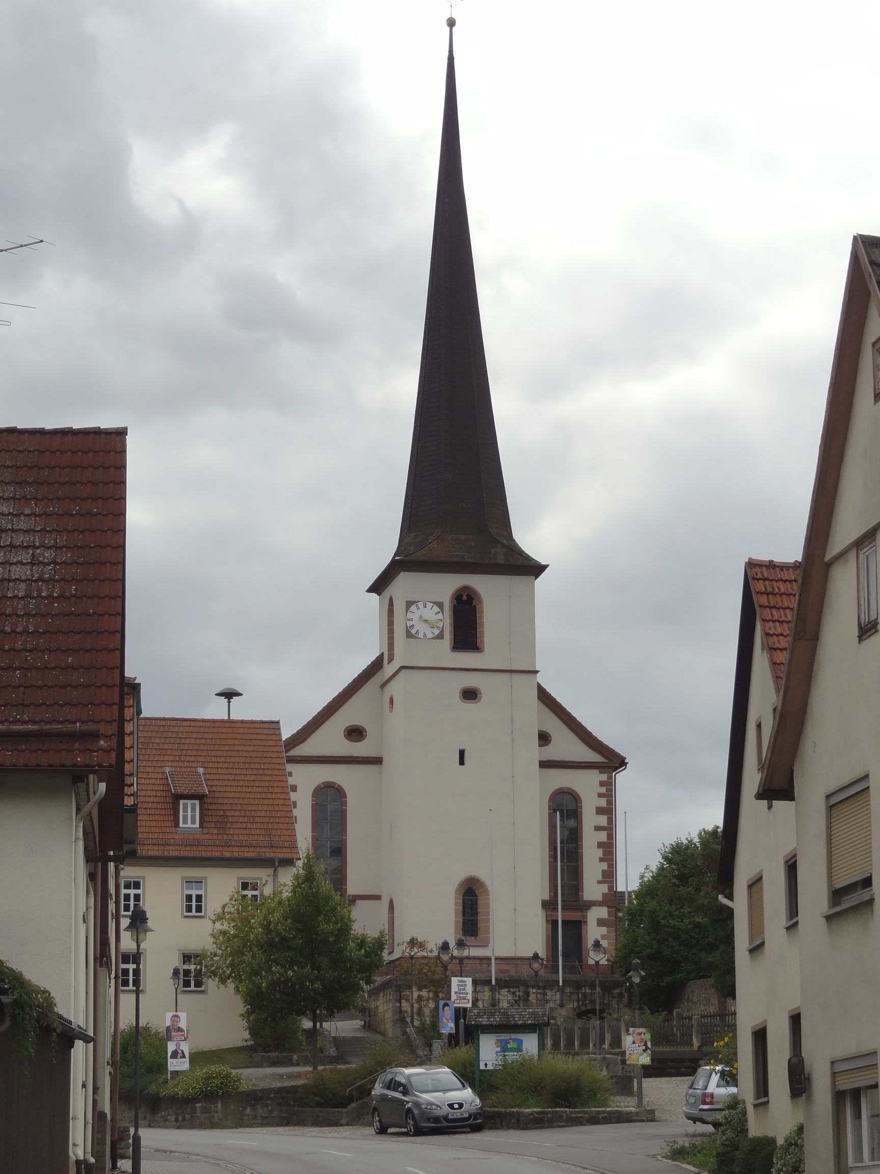 ehem. Chorturmkirche, heute Saalbau mit eingezogenem Westchor und Ostturm mit Spitzhelm, im 1615-17 nachgotisch erneuerten Turm das tonnengewölbte mittelalterliche Chorturmerdgeschoss erhalten, Langhaus mit Satteldach und Chor mit Walmdach 1810; mit AusstattungThis is a photograph of an architectural monument.